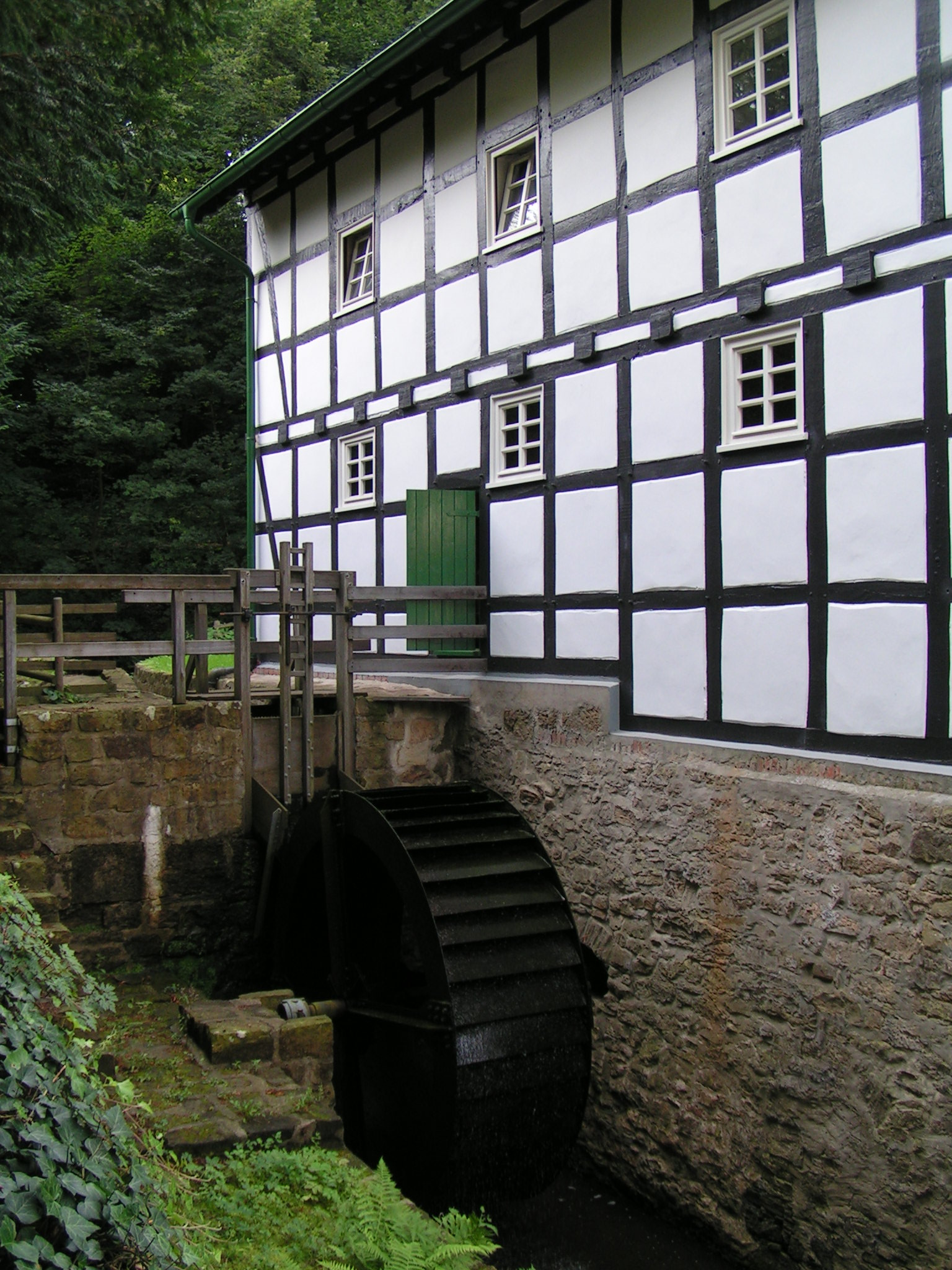 Gutswassermühle Hudenbeck in Bad Holzhausen (Preußisch Oldendorf)